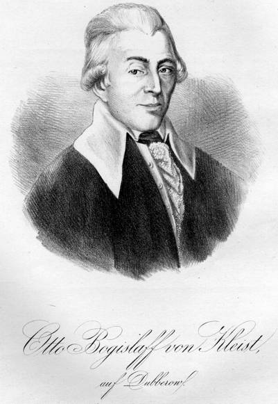 Porträt des Landrat Otto Bogislaff v. Kleist aus der Familiengeschichte v. Kleist